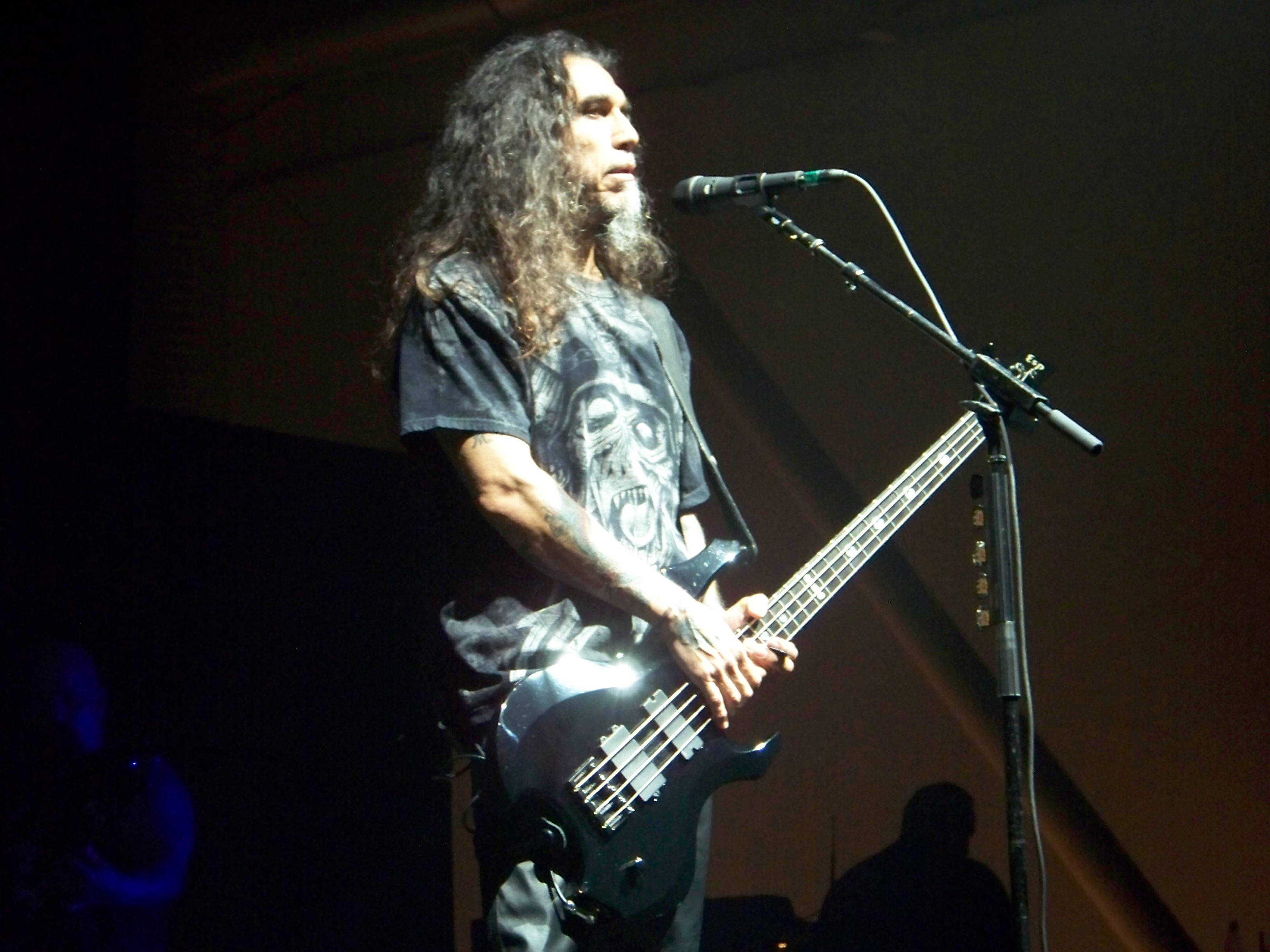 Фото Тома Арайи из Slayer. Март 2011, Киев, концерт Slayer и Megadeth.